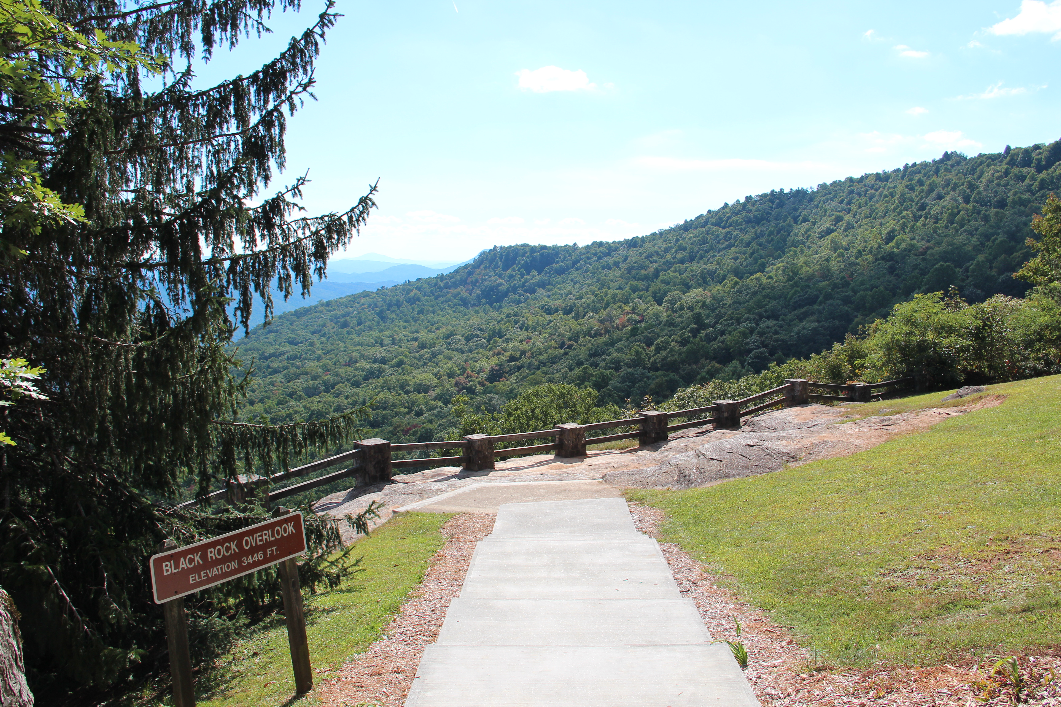 Black Rock Overlook